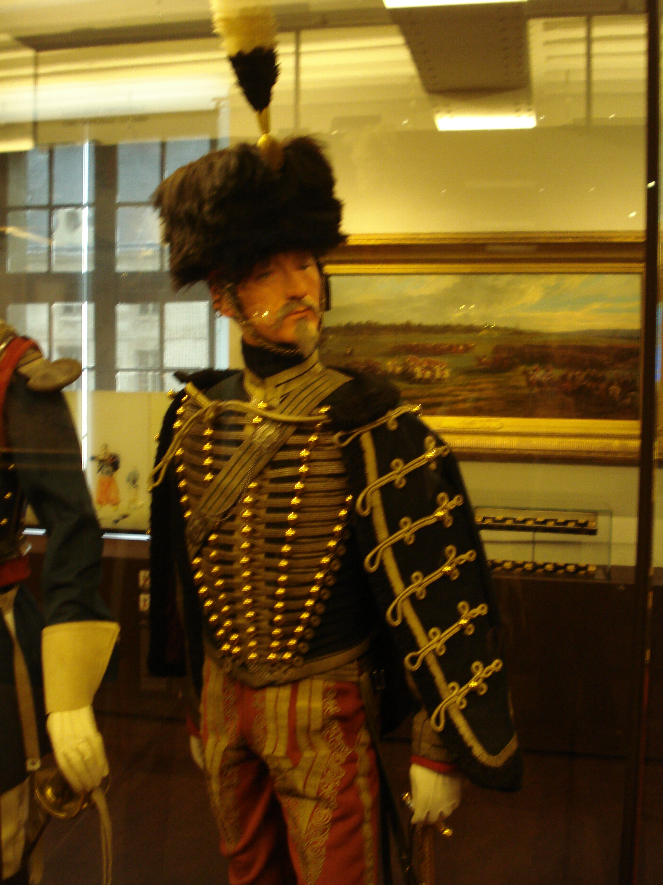 Uniforme Hussard (Second Empire)